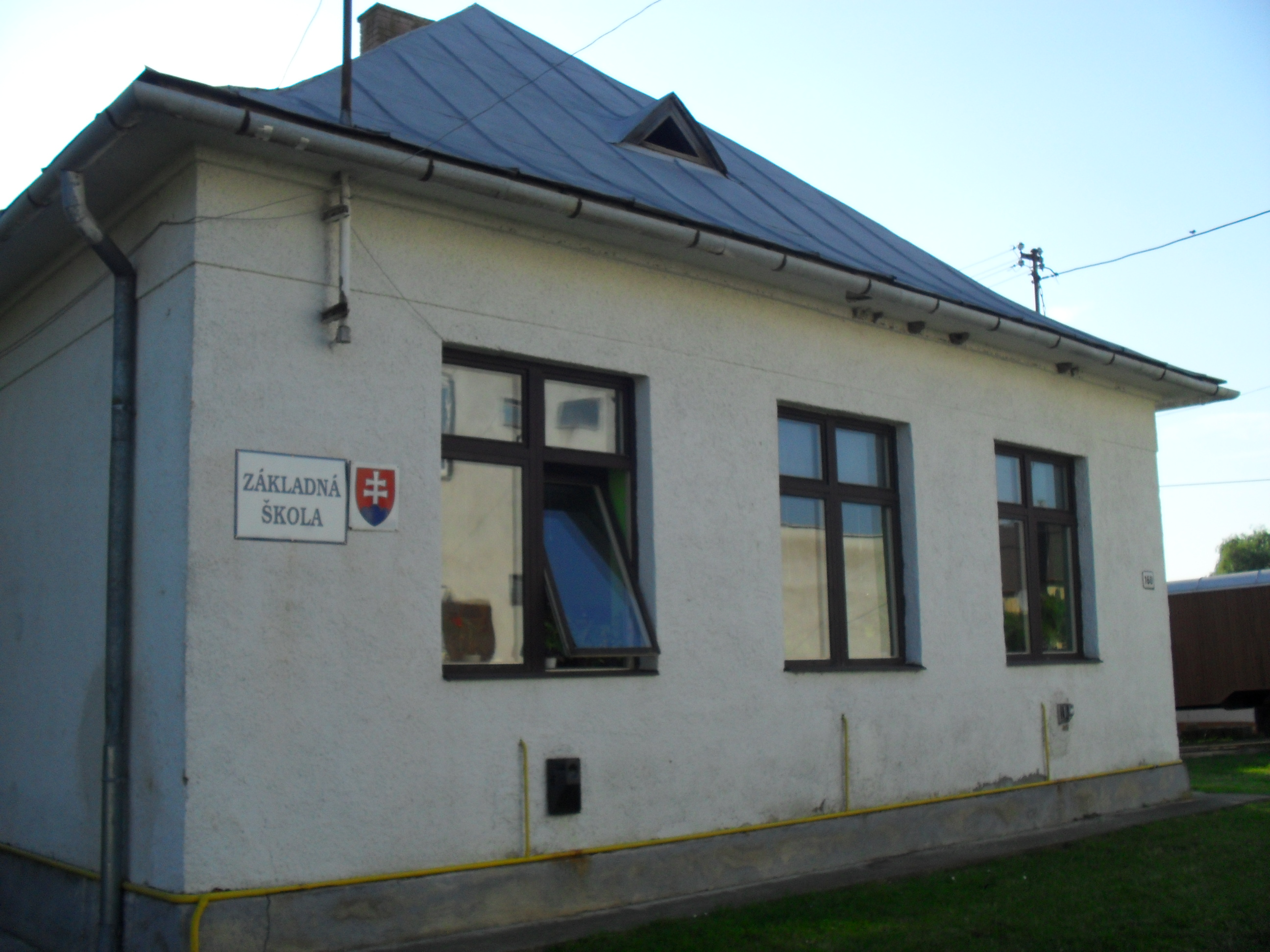 Bajánháza - alapiskola